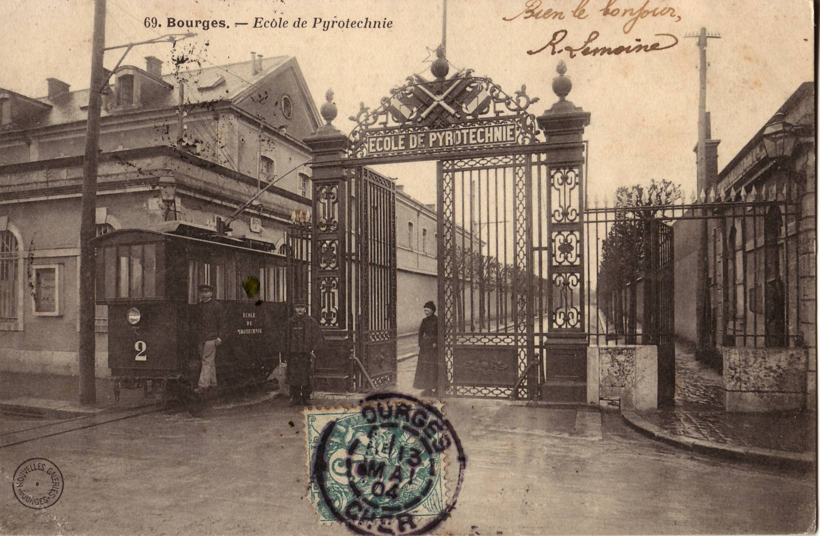 Carte postale ancienne éditée par Nouvelles galeries Bourges, n°69 : BOURGES - École de pyrotechnie